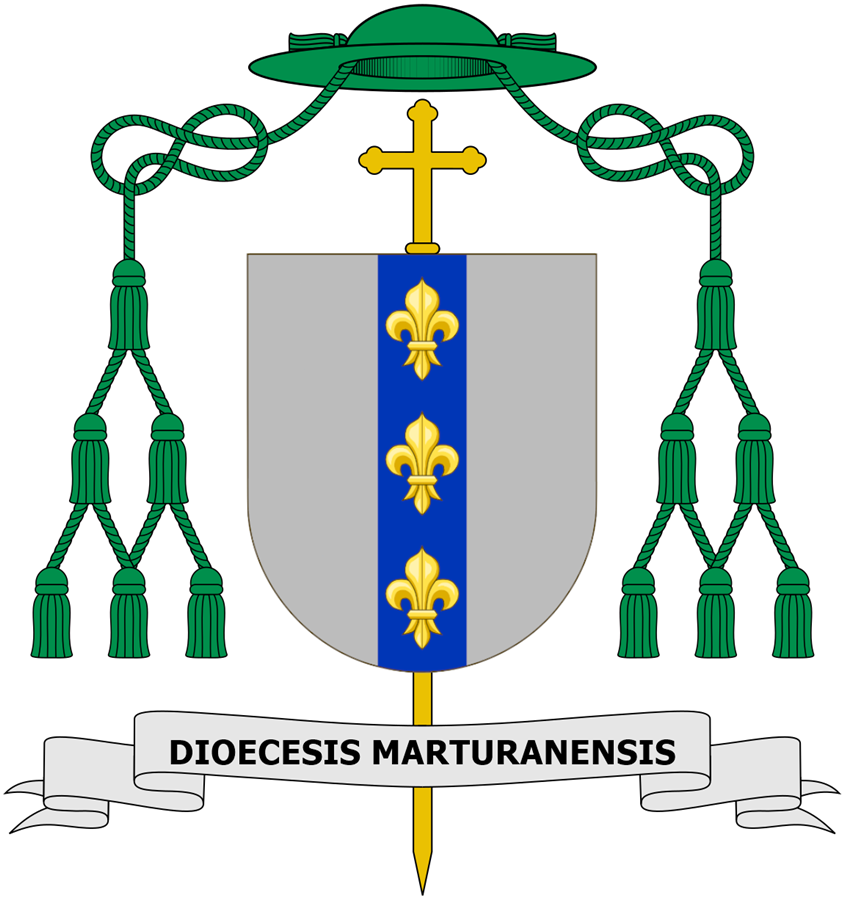 Stemma della famiglia Monaco di Cosenza, utilizzato da Francesco Monaco, vescovo di Martirano.